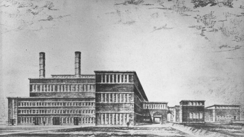 Ein deutsches Kraftwerk für Süd-Russland! Das von dem deutschen Architekten Lissel entworfene Elektrizitätswerk wurde von der A.-E.-G. in Kriwojrog (Süd-Russland) ausgeführt.